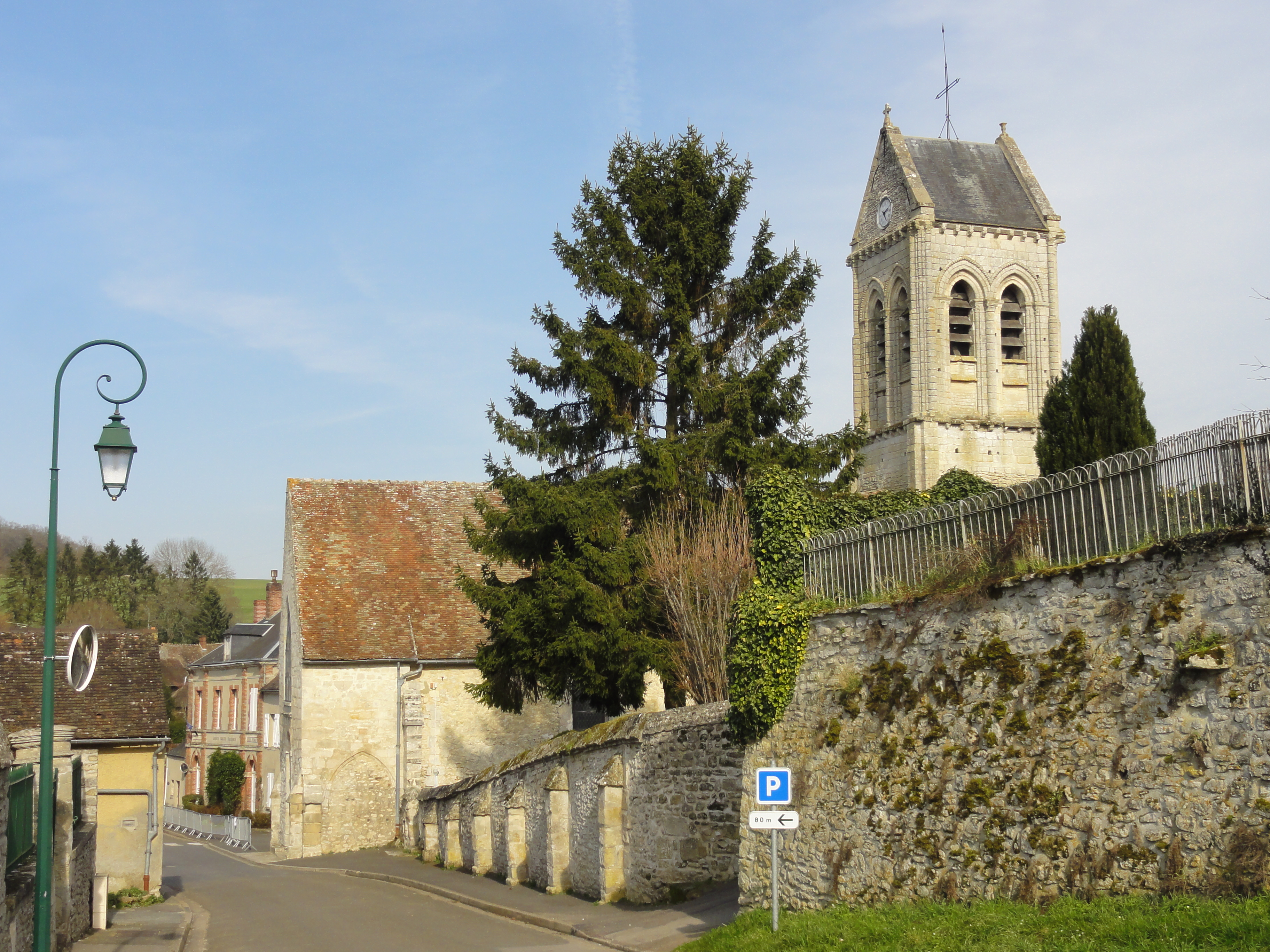 Église Saint-Léger de Delincourt - voir titre.